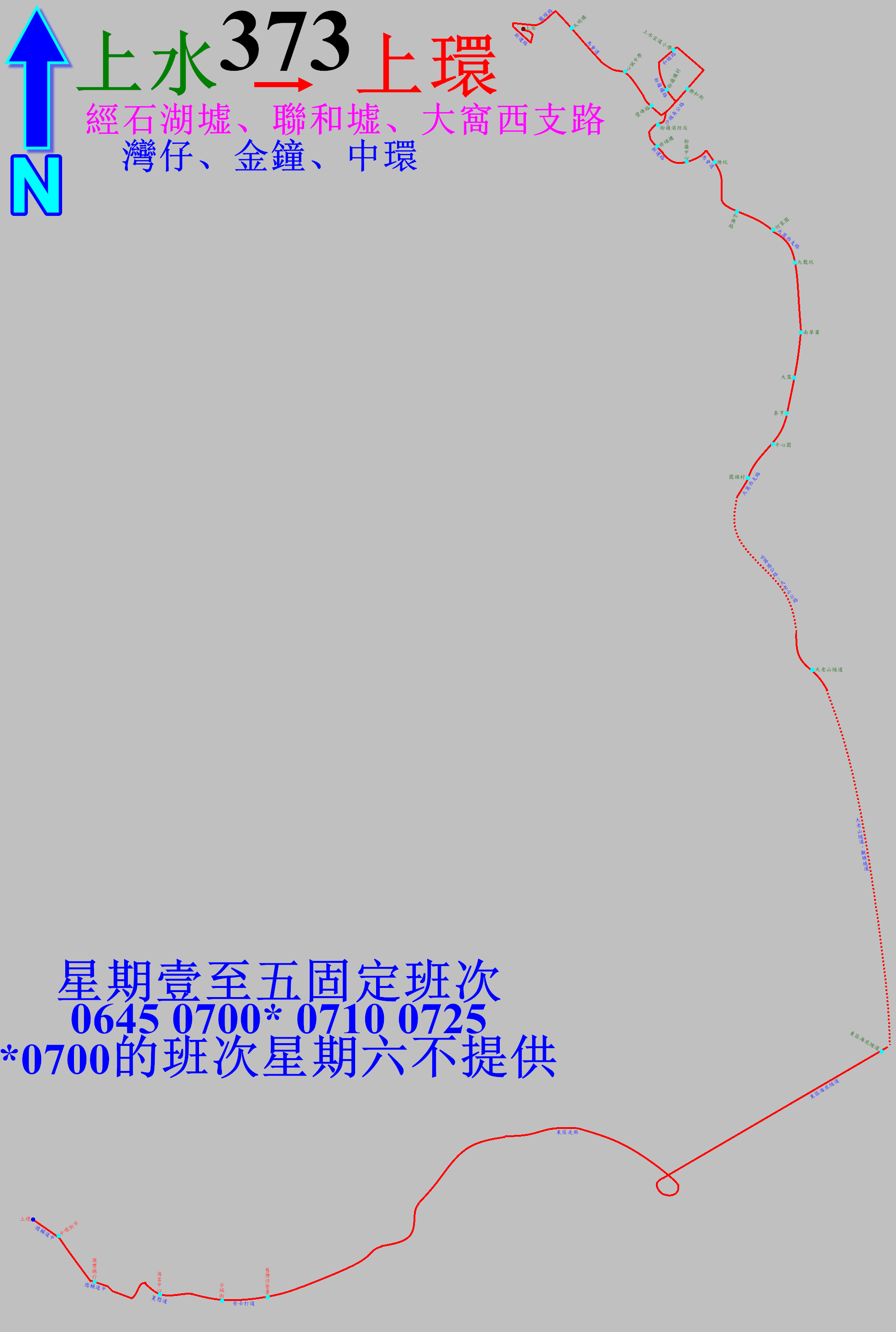 中文（香港）: 過海隧巴373線港島方向的走線圖